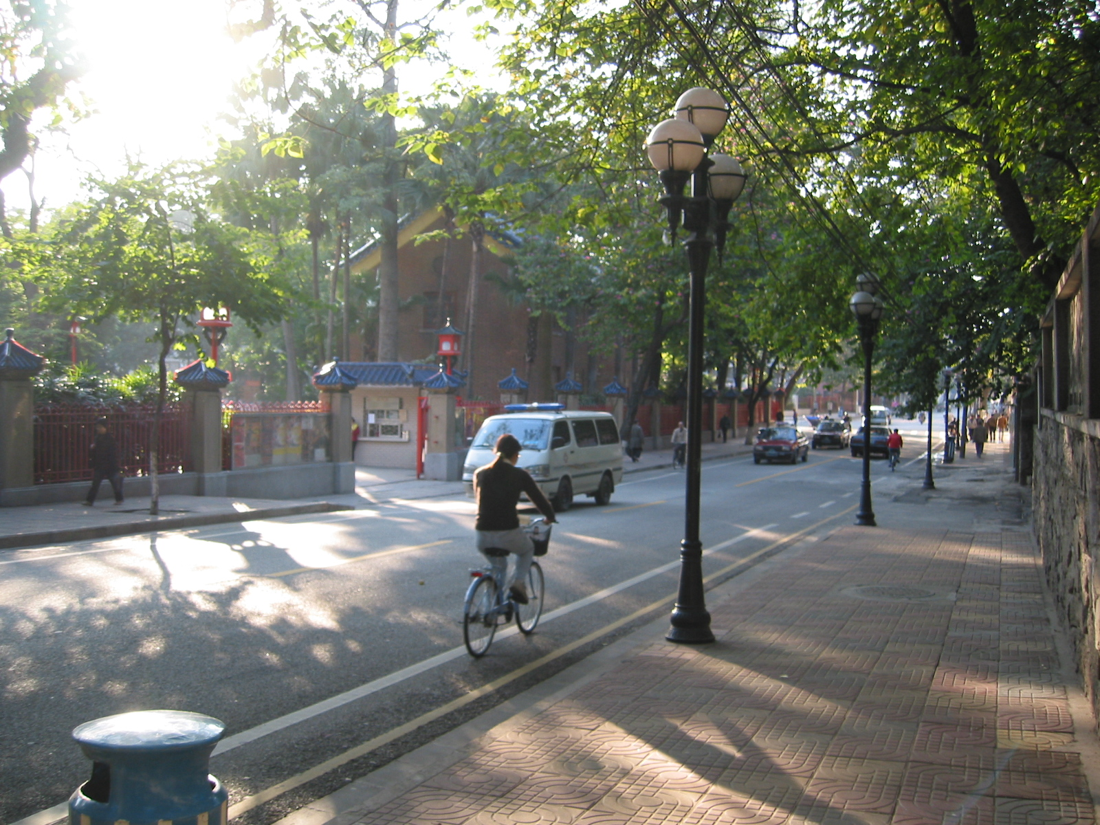 YingYuan Rd. GuangZhou China